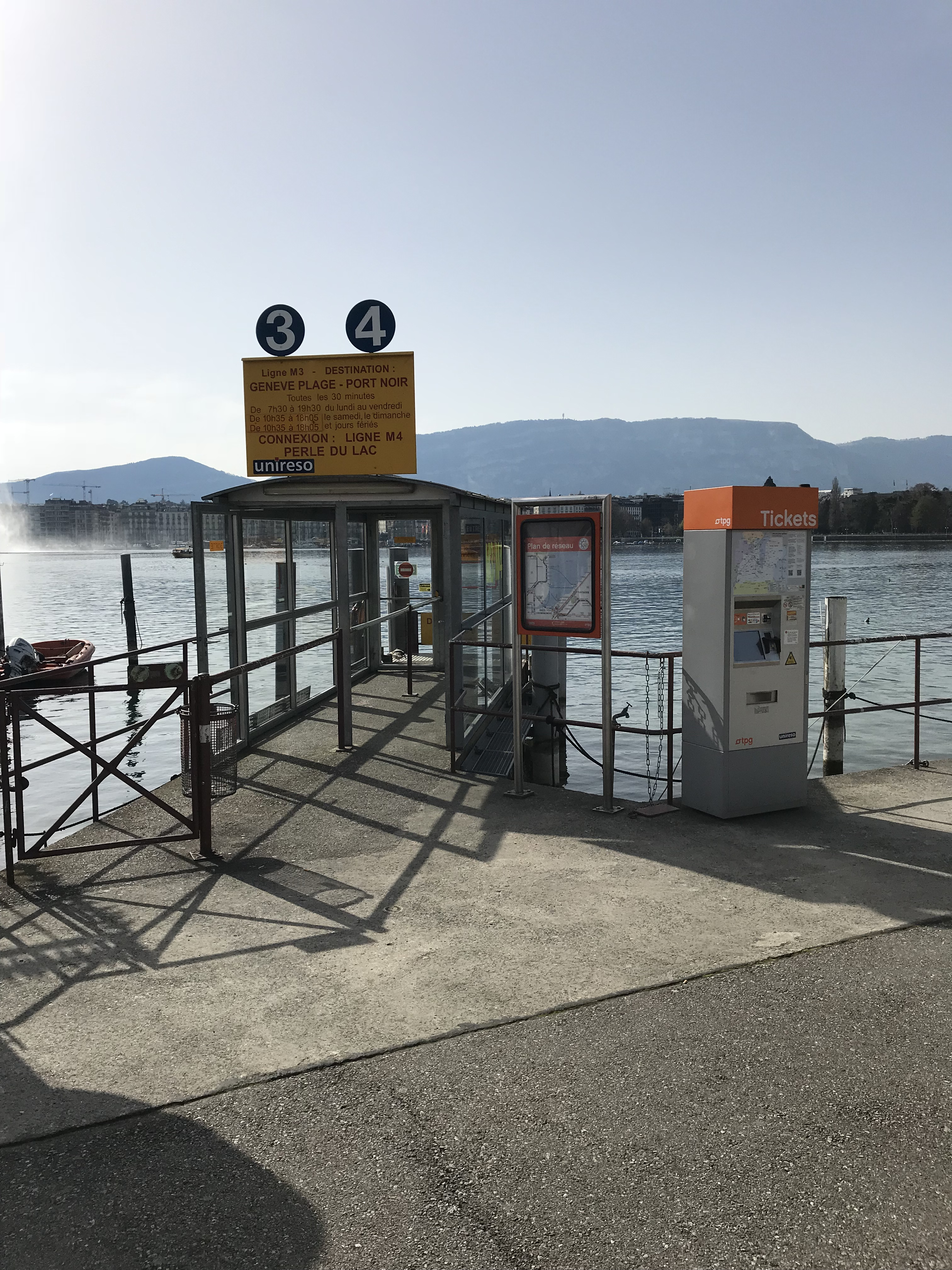 Mouettes genevoises (2018).